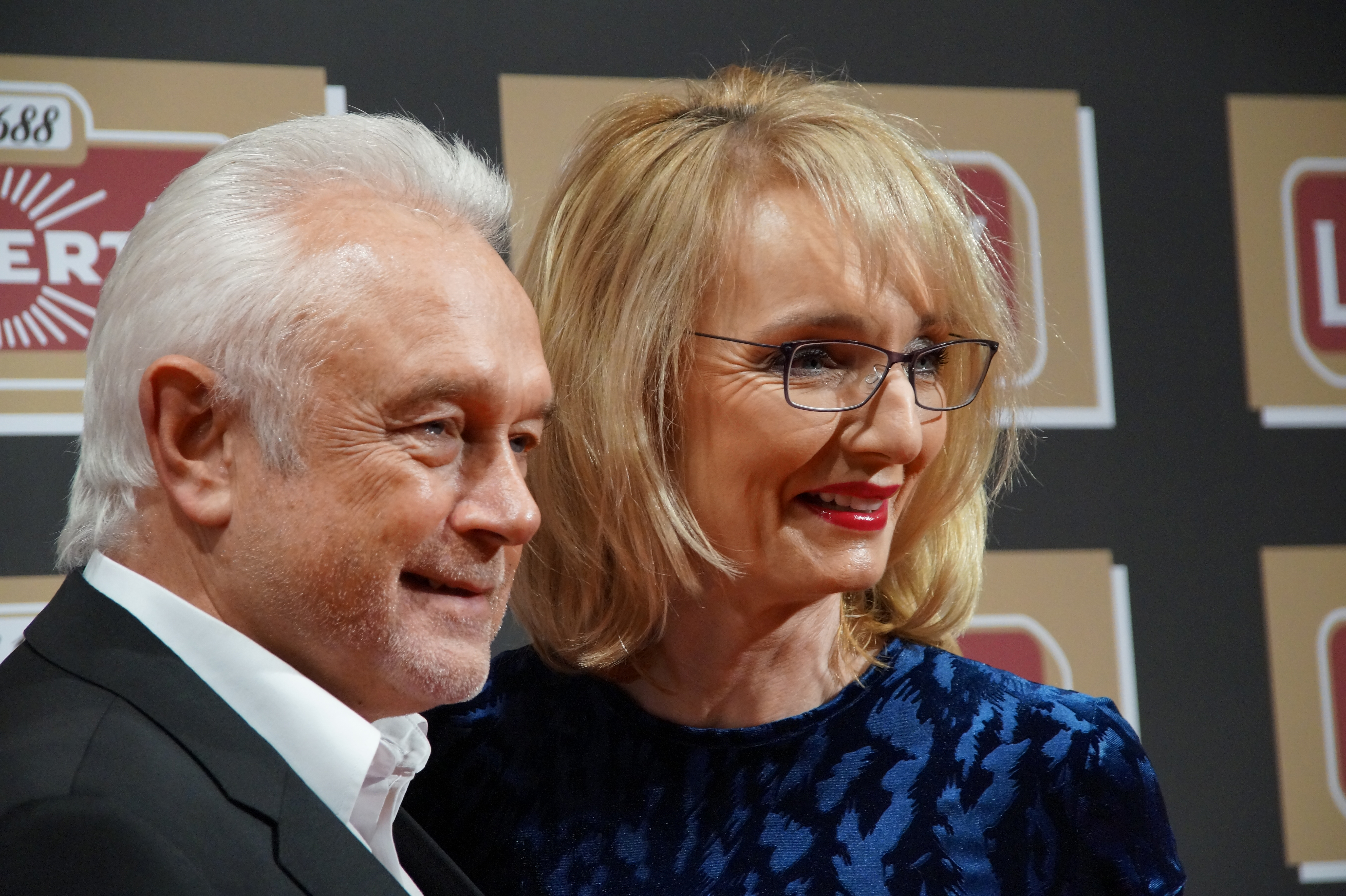 Wolfgang Kubicki mit Ehefrau Annette Marberth-Kubicki bei der Lambertz Monday Night, im Februar 2016.